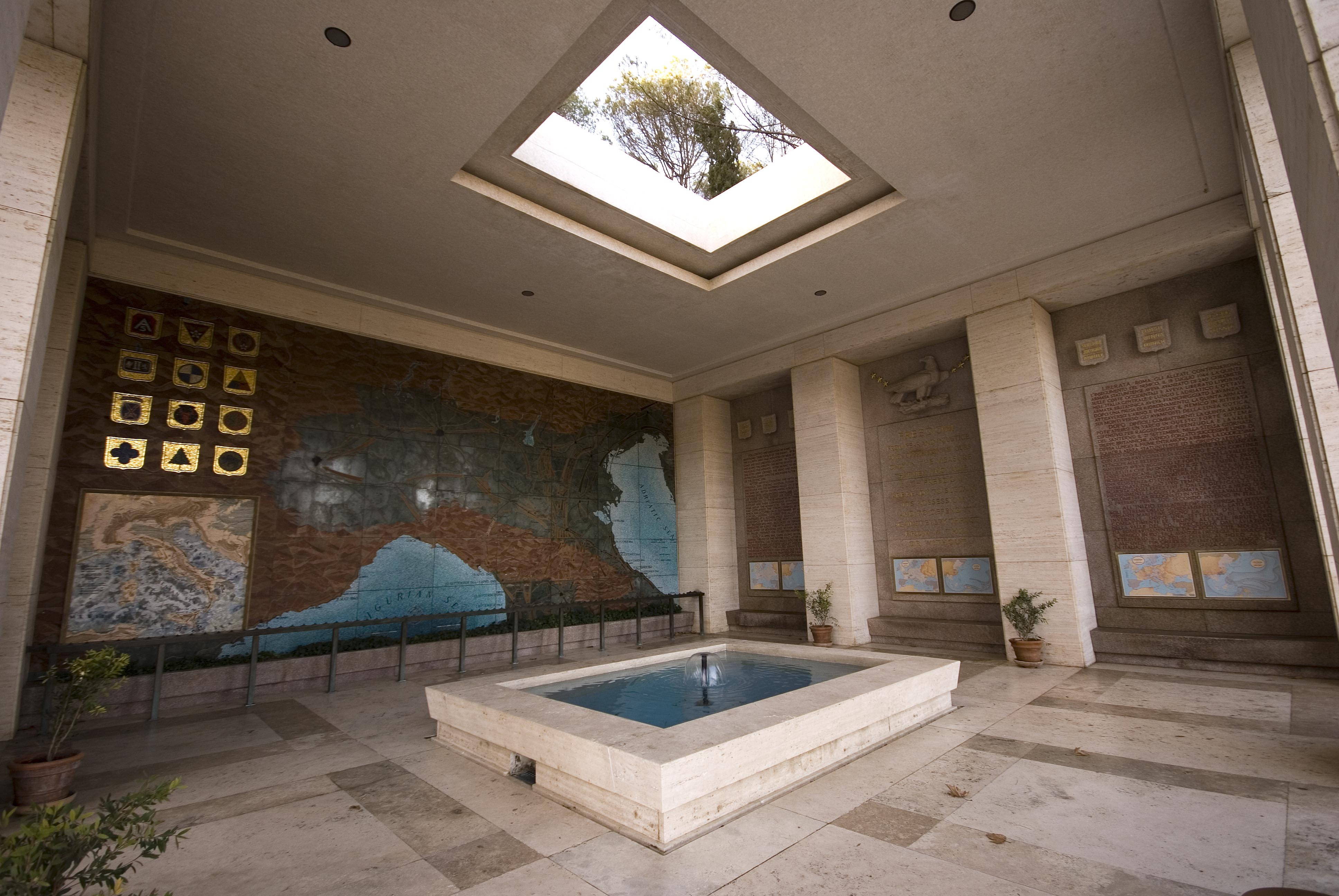 sala interna del cimitero degli americani ai Falciani